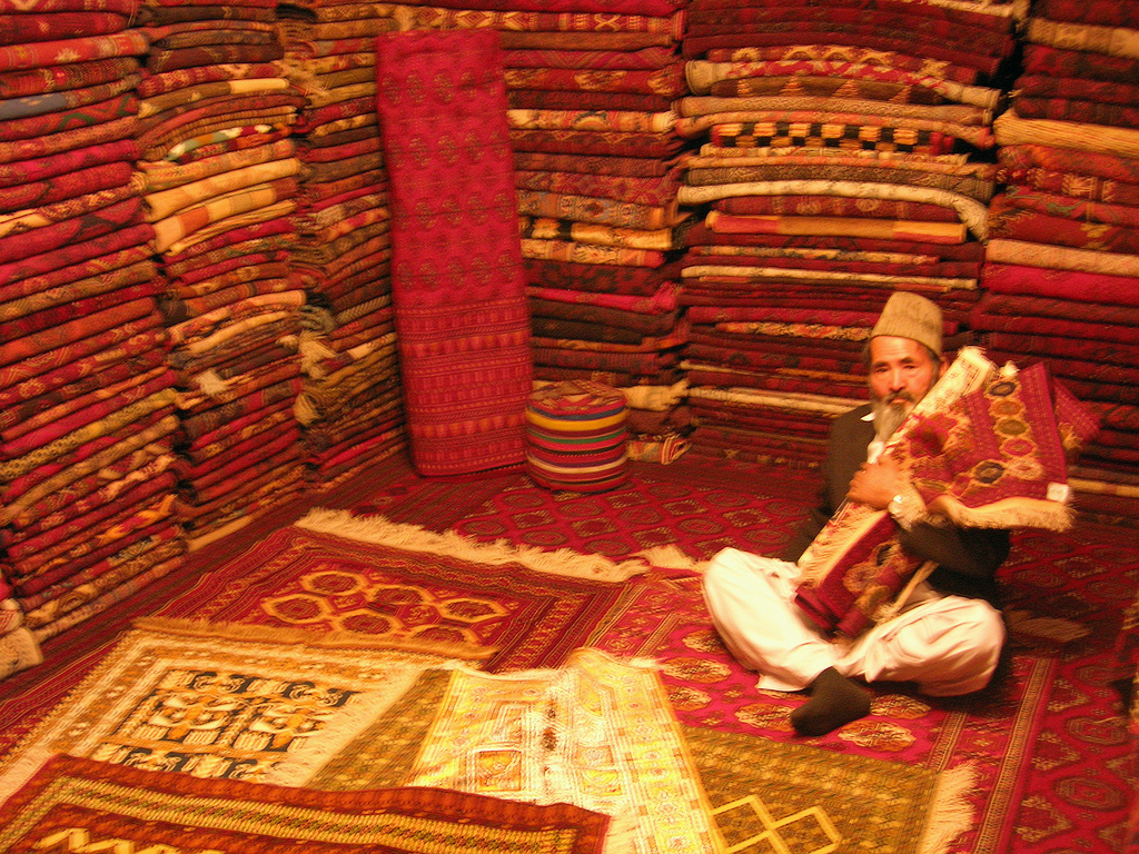 Carpet seller in Kabul, Afghanistan